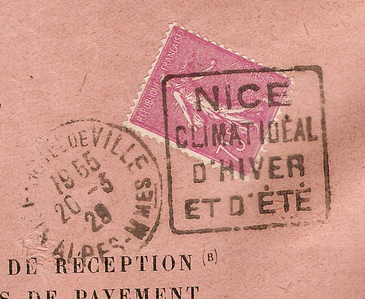 Empreinte de la machine Daguin du bureau de Nice Hotel de Ville en 1929